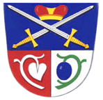 Znak obce Korytná